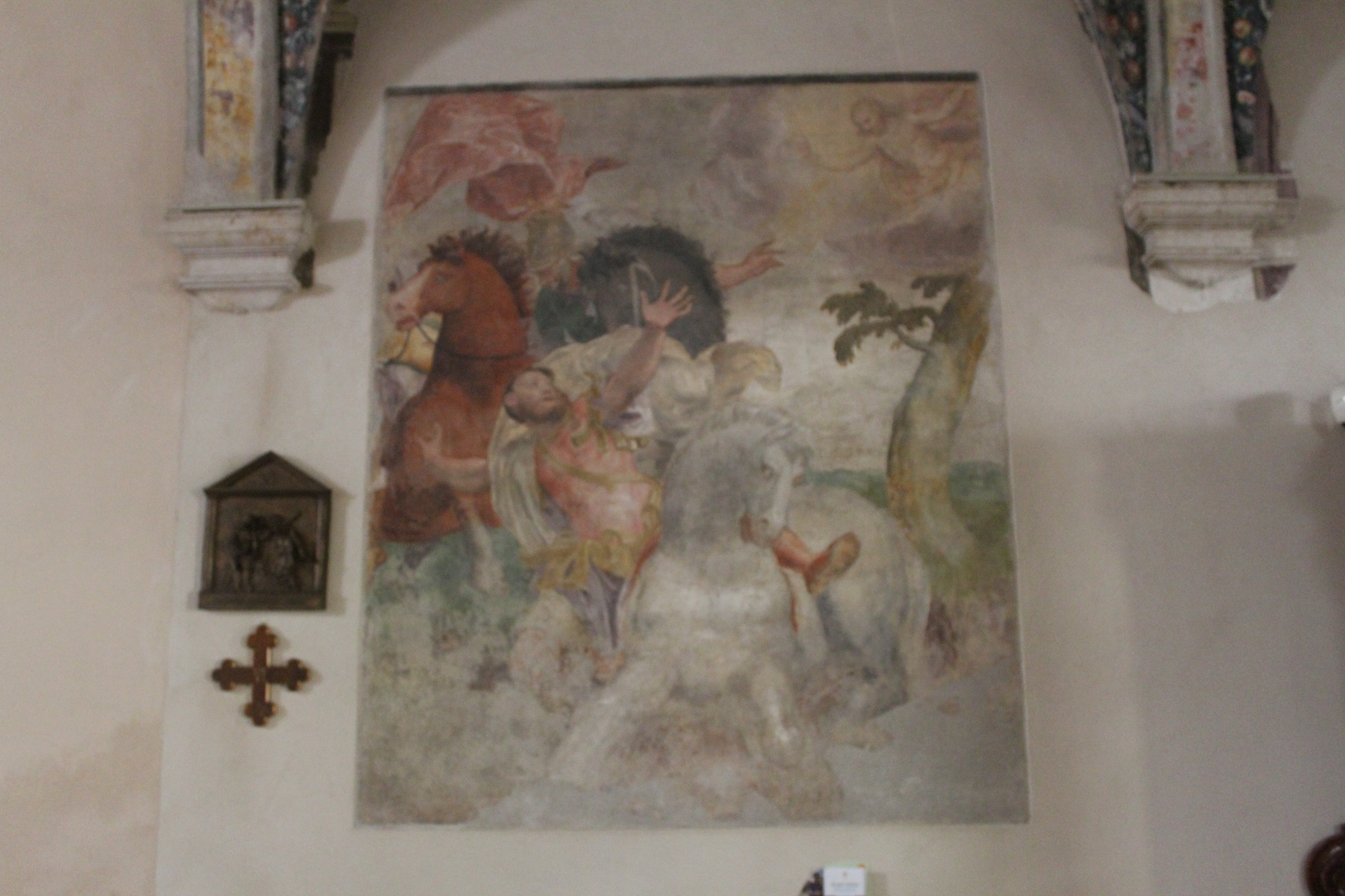 Chiesa della Santissima Trinità in Monte Oliveto a Verona